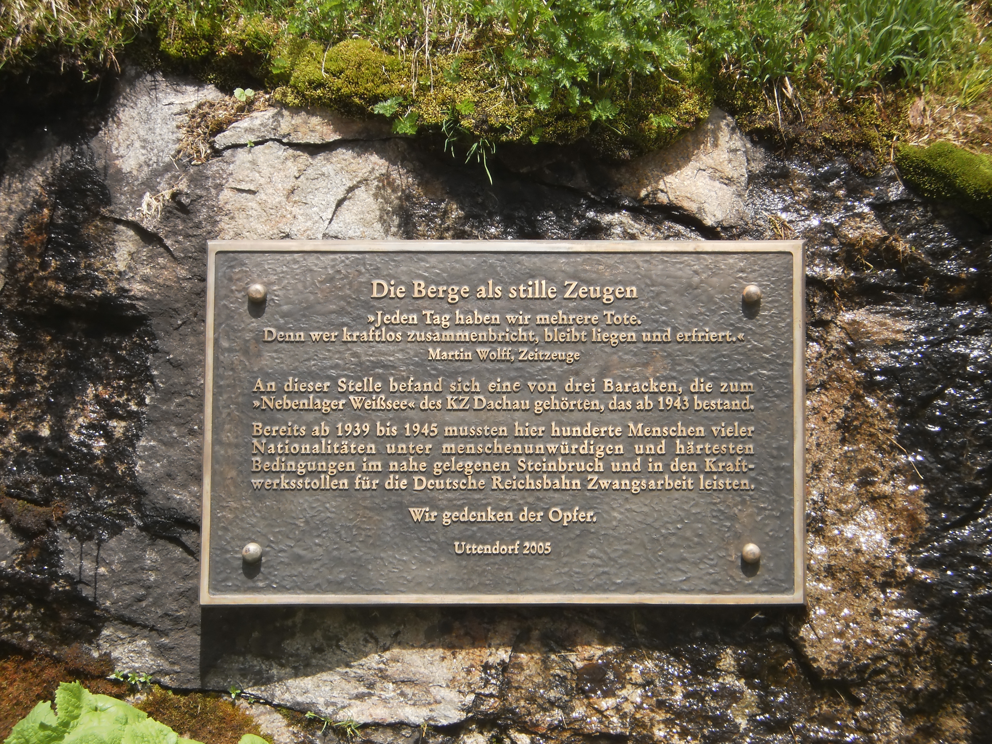 Gedenktafel für die Opfer des 2. Weltkrieges